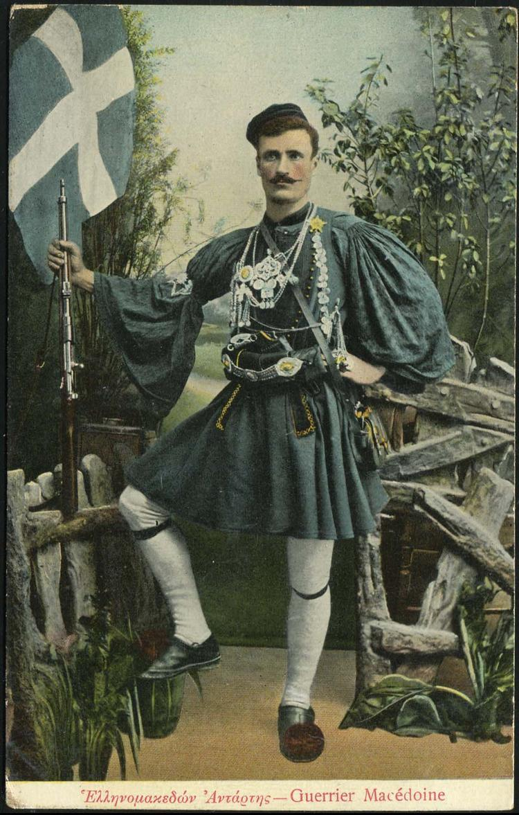 Андартският капитан от Влашка Блаца Христос Аргиракос с псевдоним Кицос Морикис